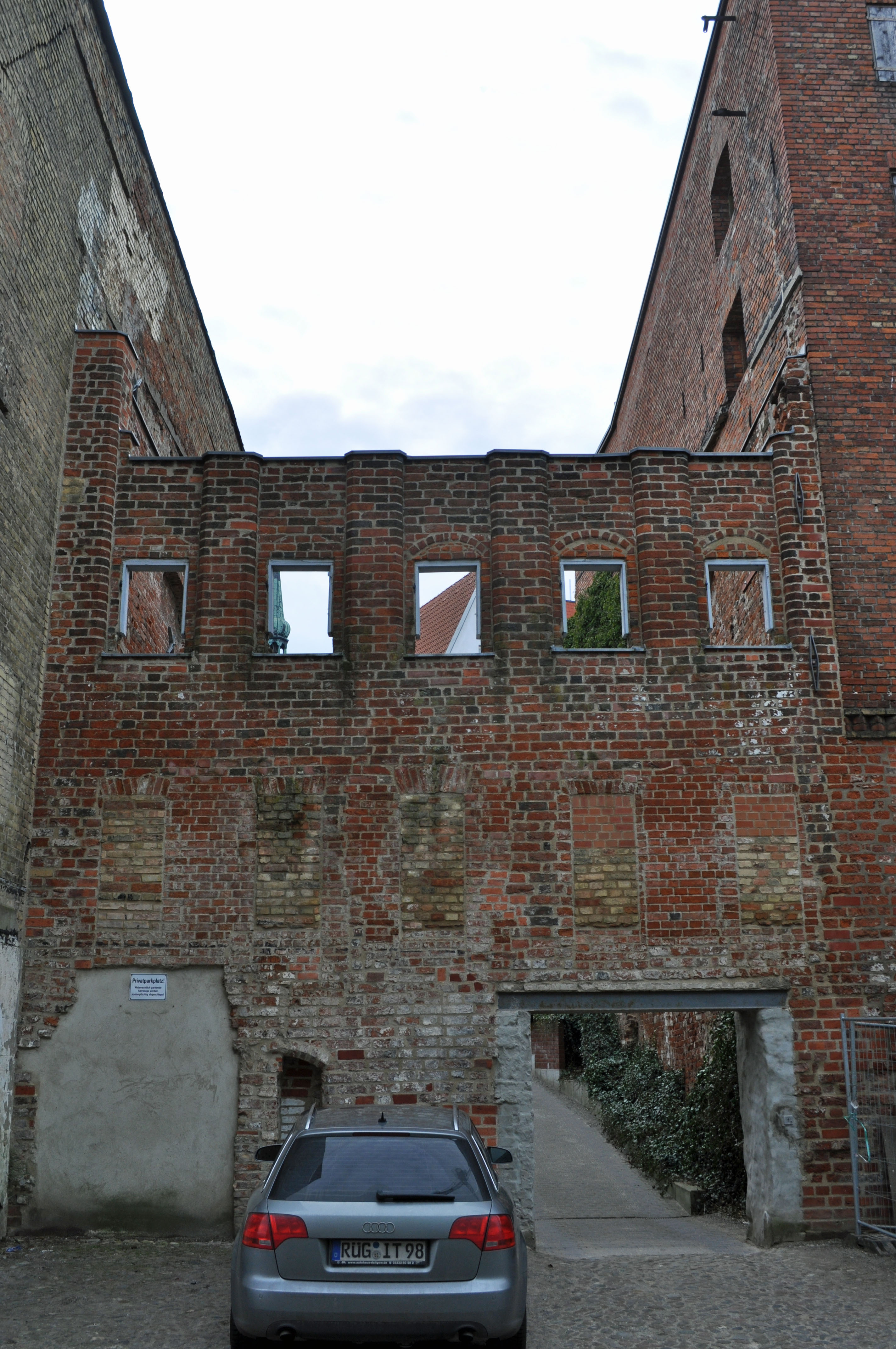 Gebäude bzw. Gebäudedetail in Stralsund. Straße und Hausnummer siehe Dateiname.